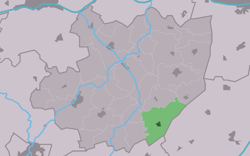 Kaartsje fan himrik fan Boazum